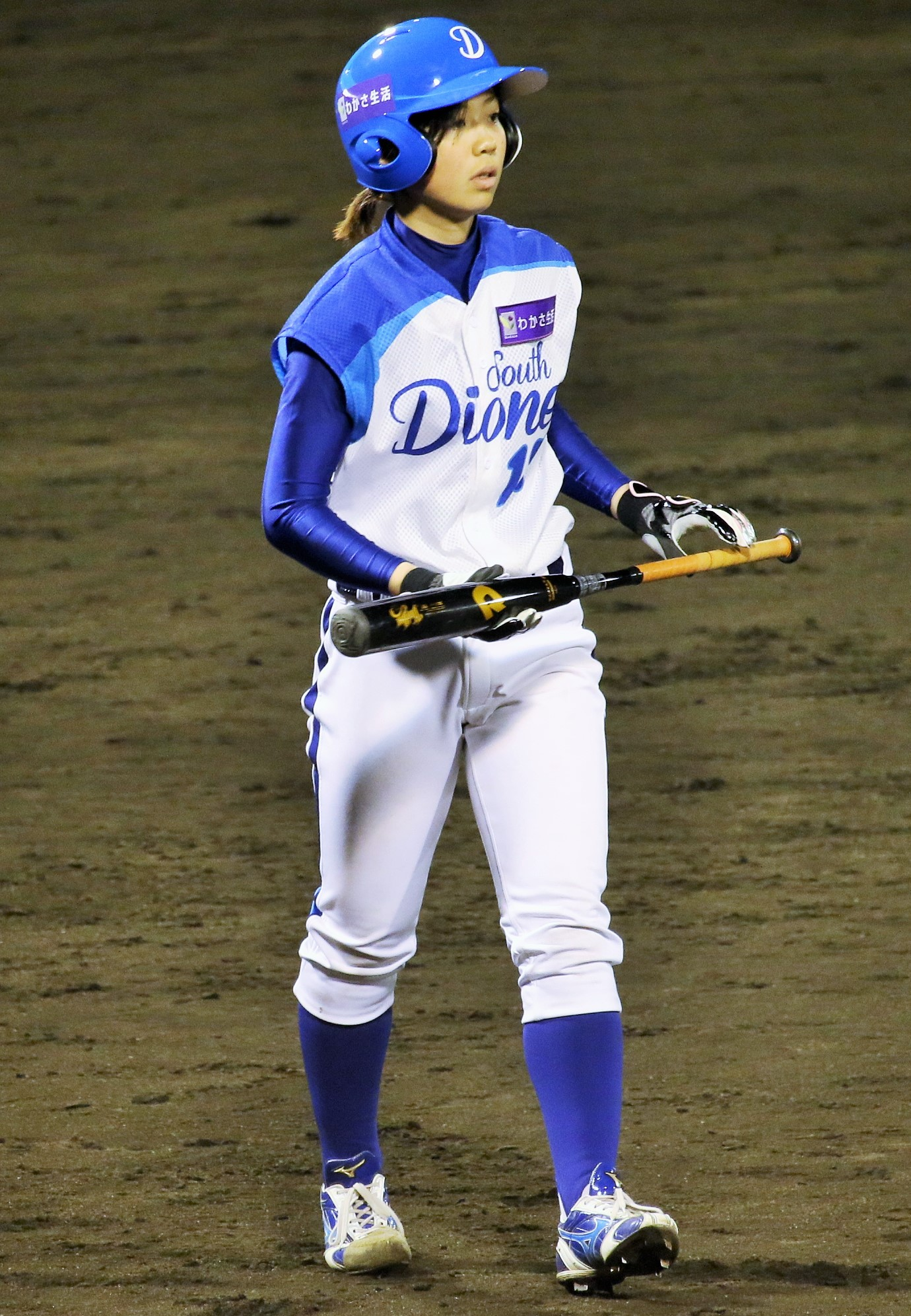 サウス・ディオーネ時代の奥村奈未。わかさスタジアム京都にて。